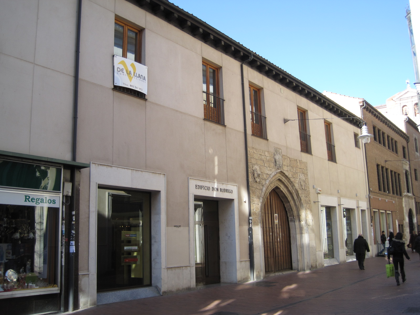 Vista de parte del edificio que pertenece a las monjas de Portaceli. La Casa de las Aldabas se encontraba a continuación y ya no existe. Valladolid (España).